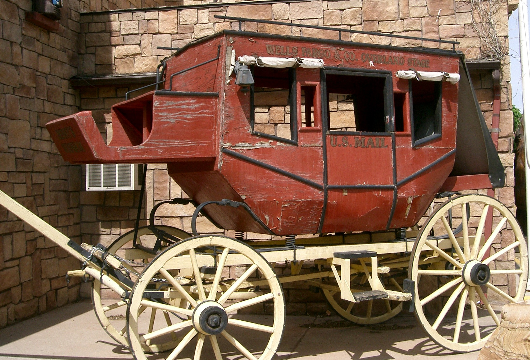 Diligence à Kanab, Utah (USA) - U.S.Mail Wells Fargo